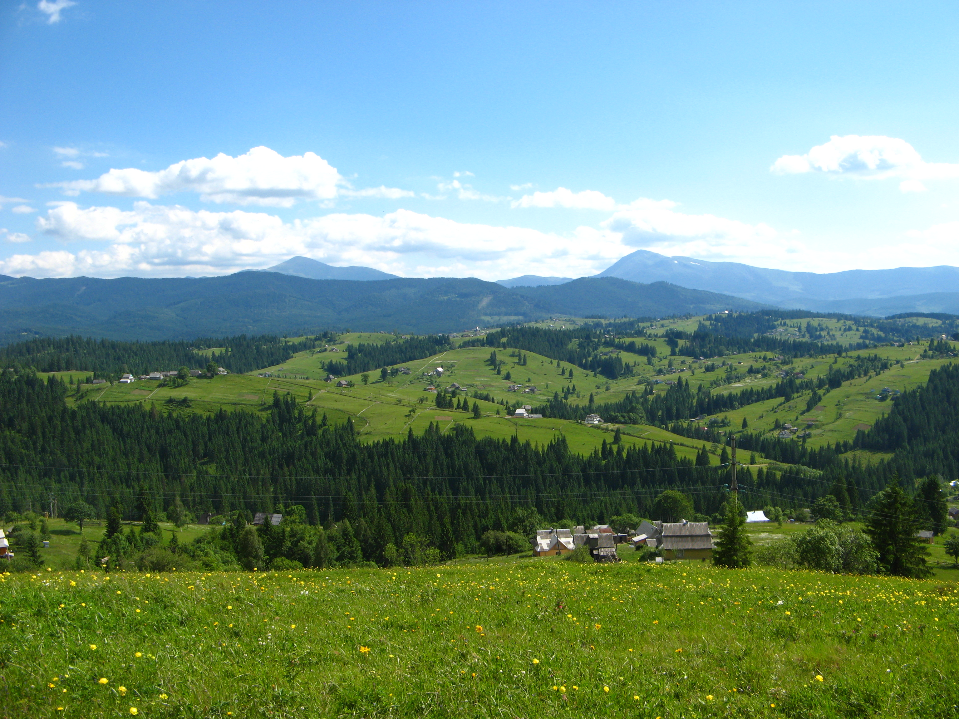 село Яблуниця (Яремчанська міськрада, Івано-Франківська обл.)